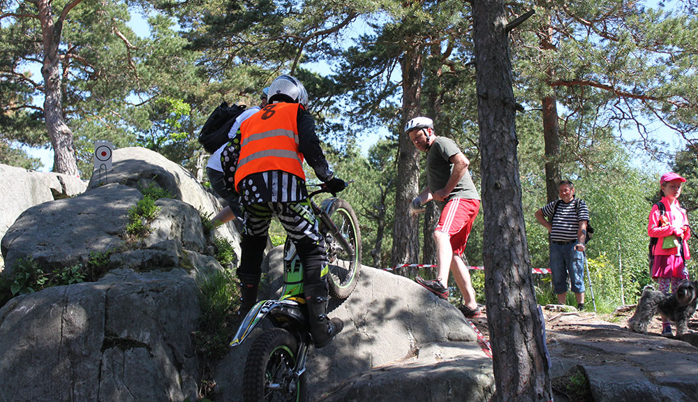 Trialkjøring - en av hovedaktivitetene i organisasjonen